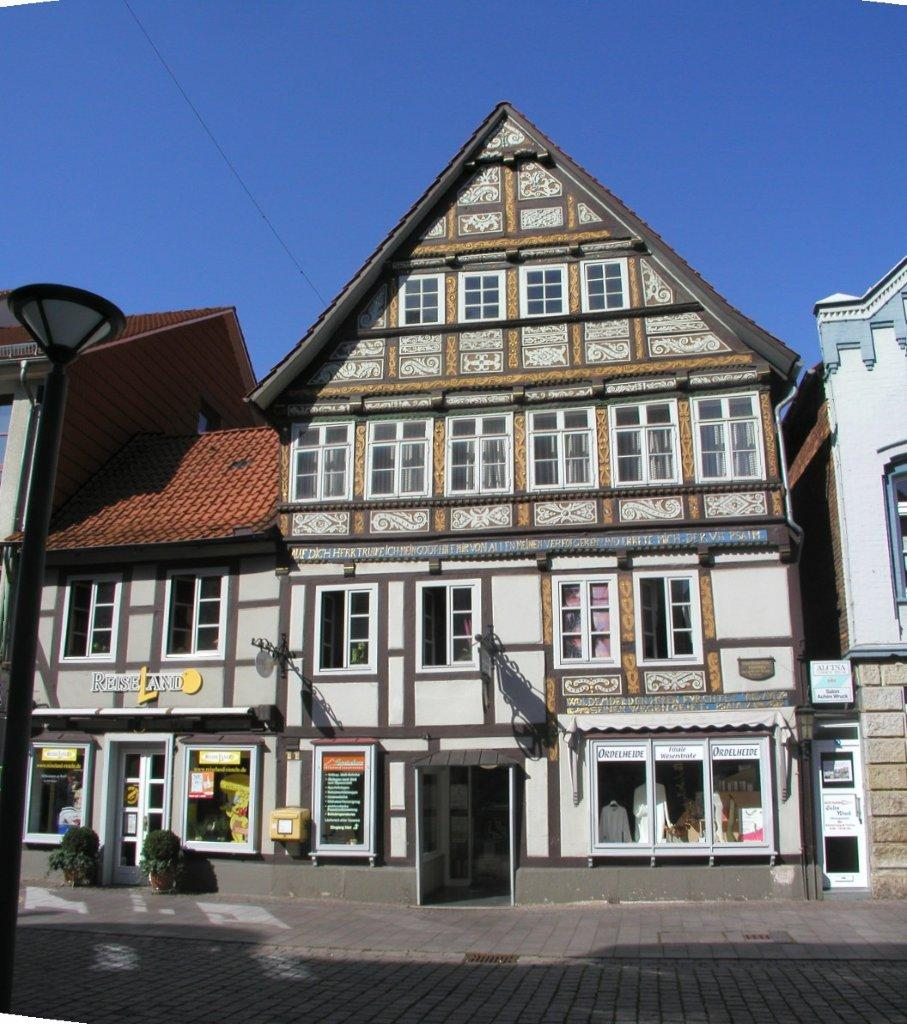 Ehemalige Universitätskommisse in der Weserstraße, erbaut 1621